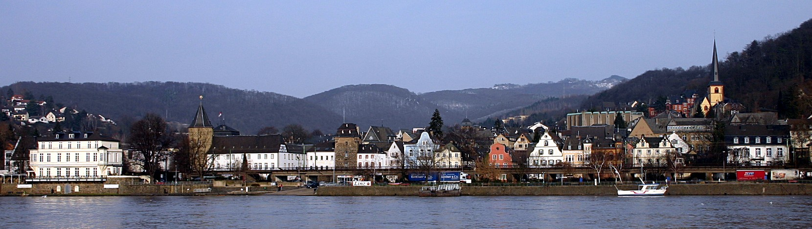 Linz am Rhein, vom gegenüberliegenden Rheinufer